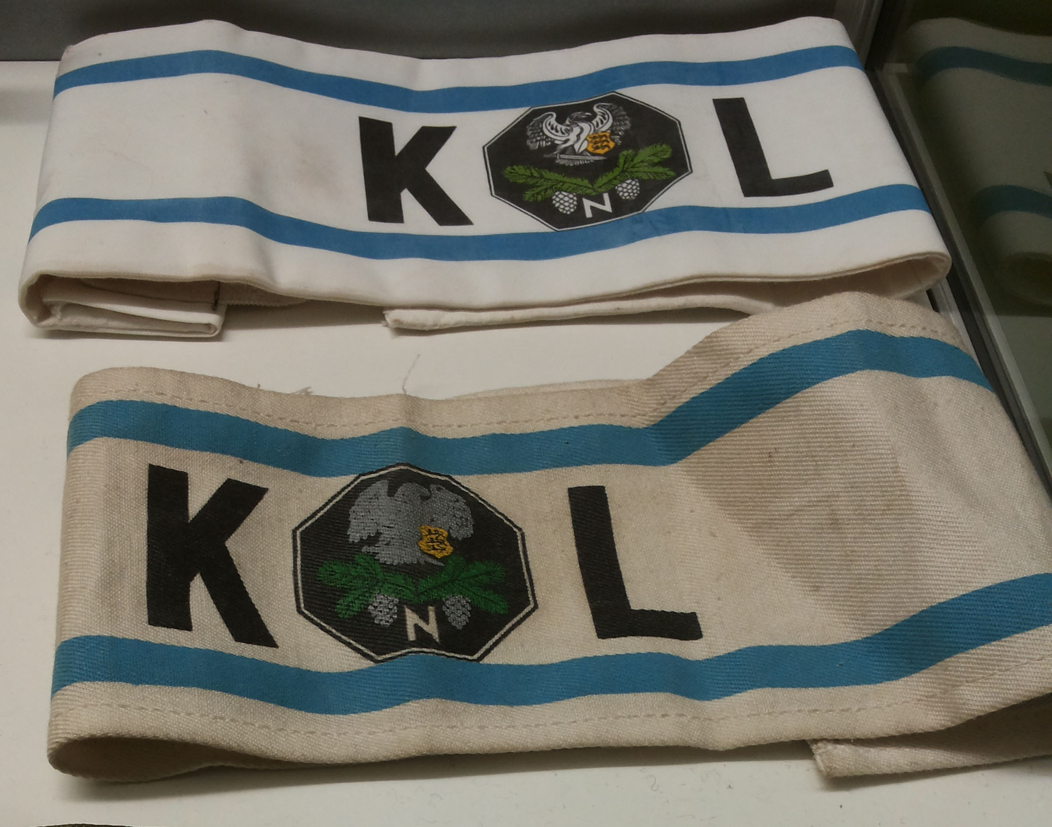 Nõmme Kaitseliidu käiselindid.